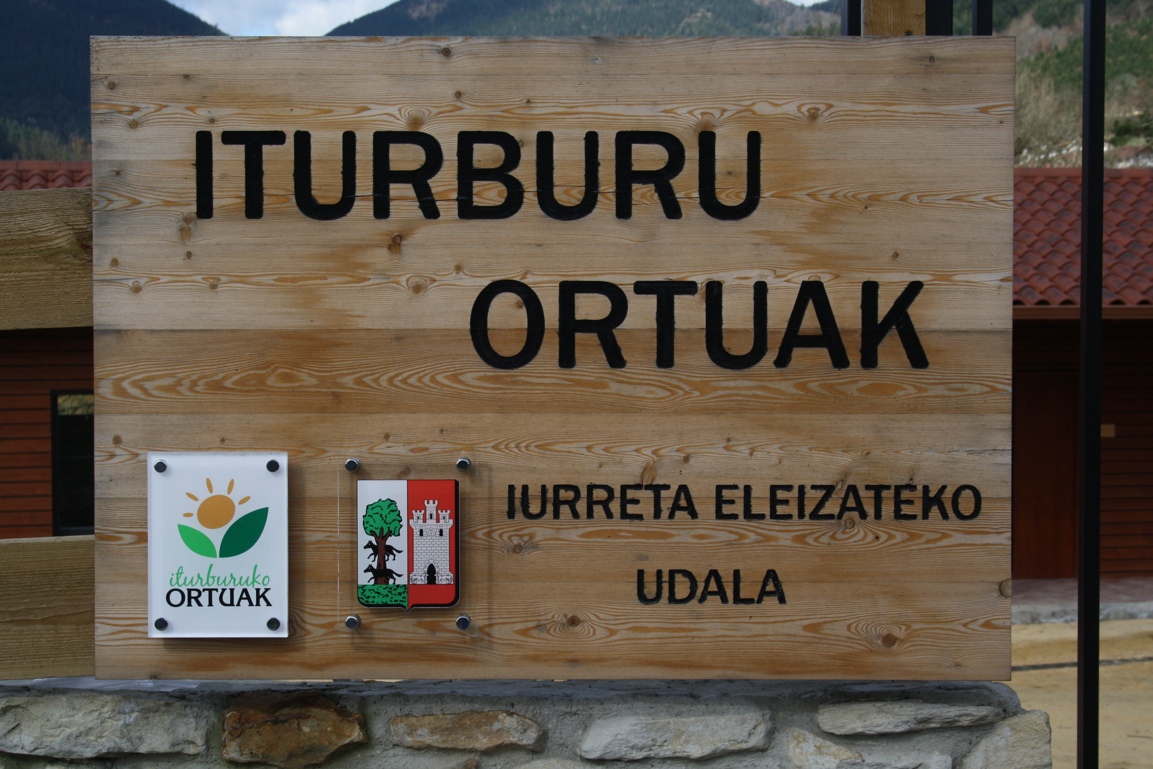 Iurretako Ortu ekologikoak